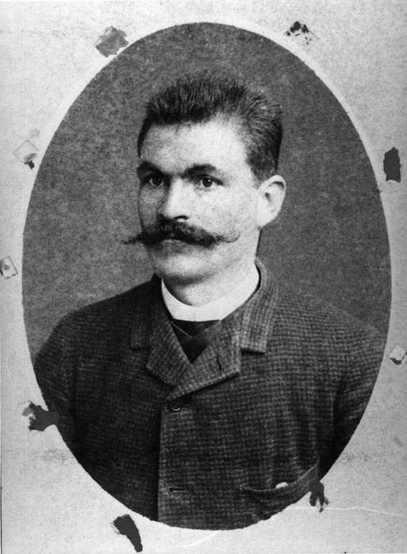 Георгиос Героянис